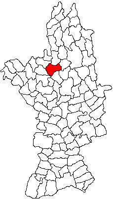 Categorie:Hărţi ale judeţului Olt